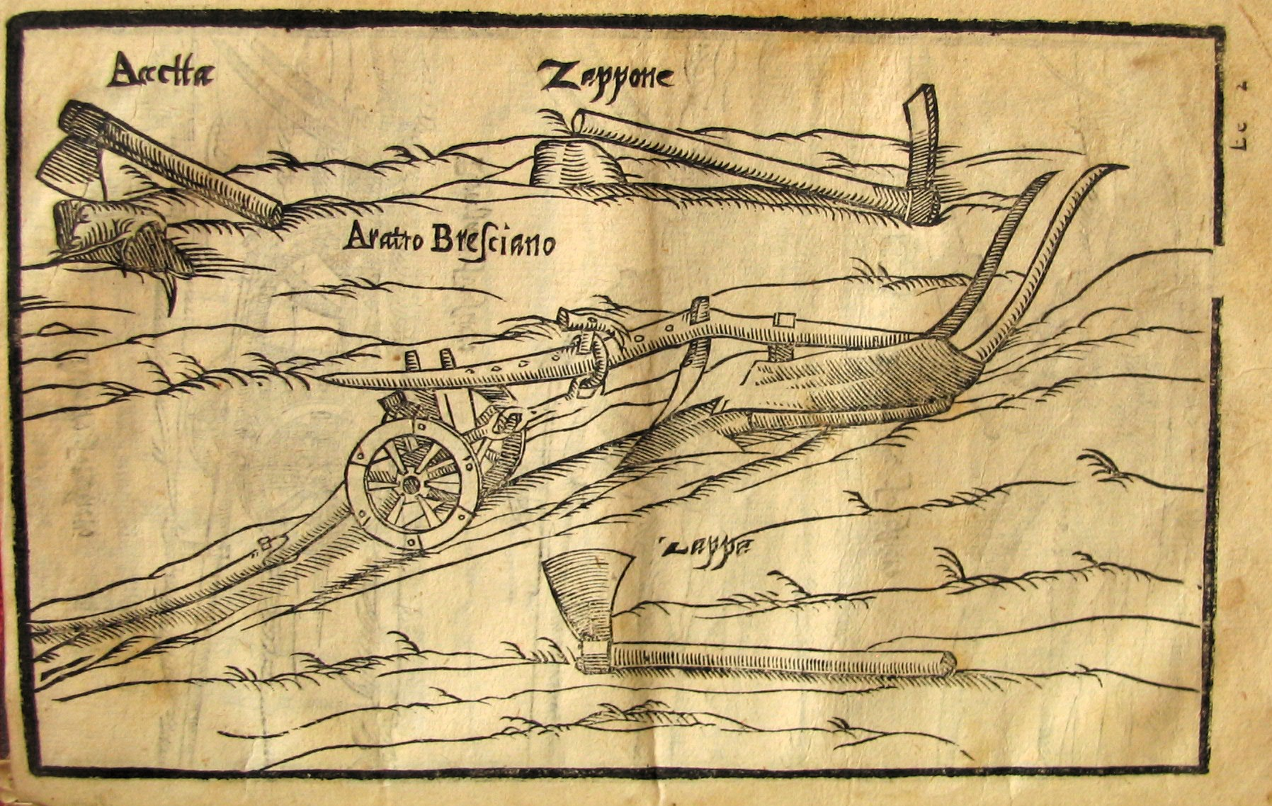 Gallo, Agostino, La primera jornada de la agricultura. Grabado de arado y hachas